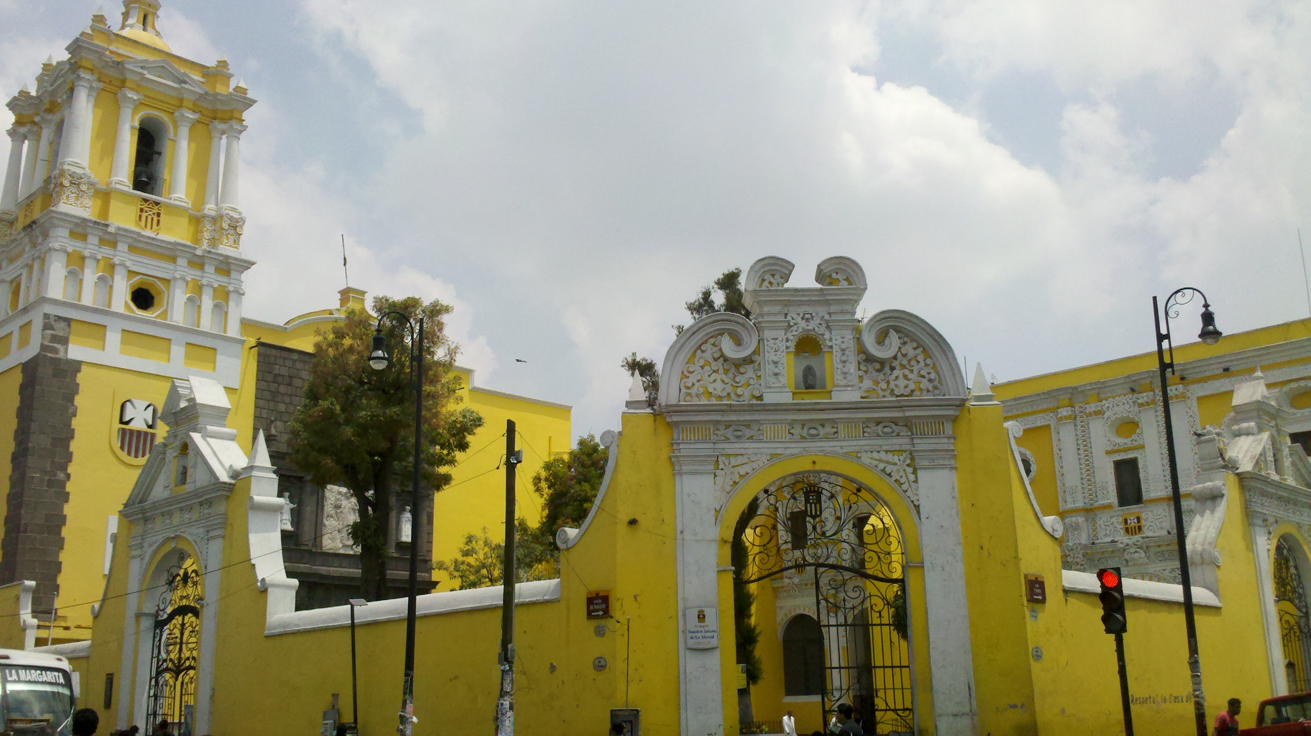 Templo Nuestra Señora de la Merced, Puebla, México. Siglo XVII. 5 norte 1001.